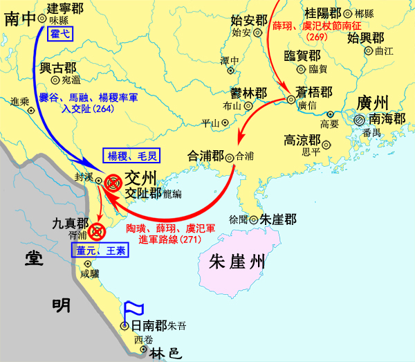 三國末期交阯之亂（263－271）示意圖，參考譚其驤《中國歷史地圖集》